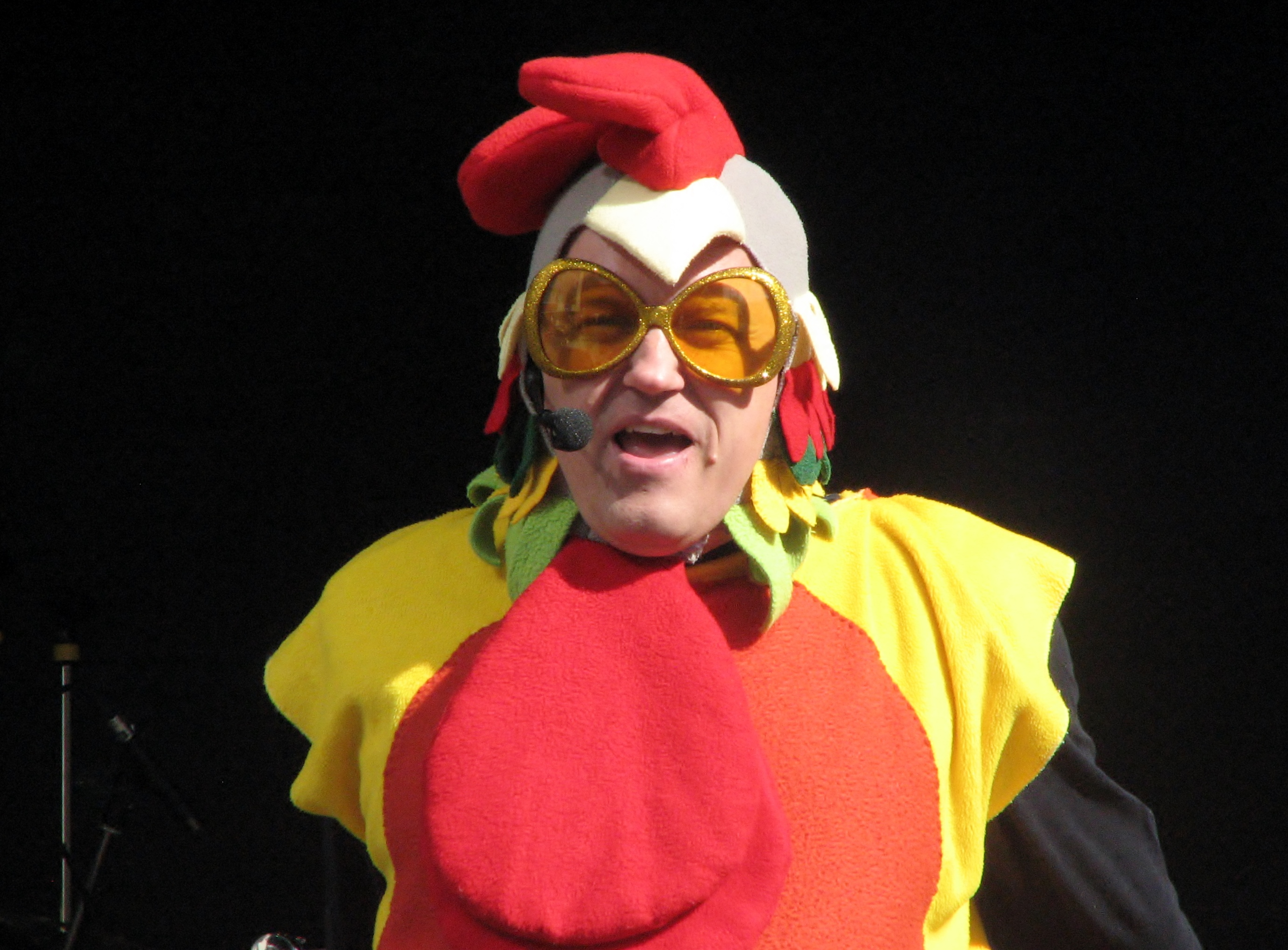 Venno Loosaar lõbustas Nokia kontserdimaja ees toimunud Aabitsapeo tervitusel aabitsakukena esimesse klassi minejaid.